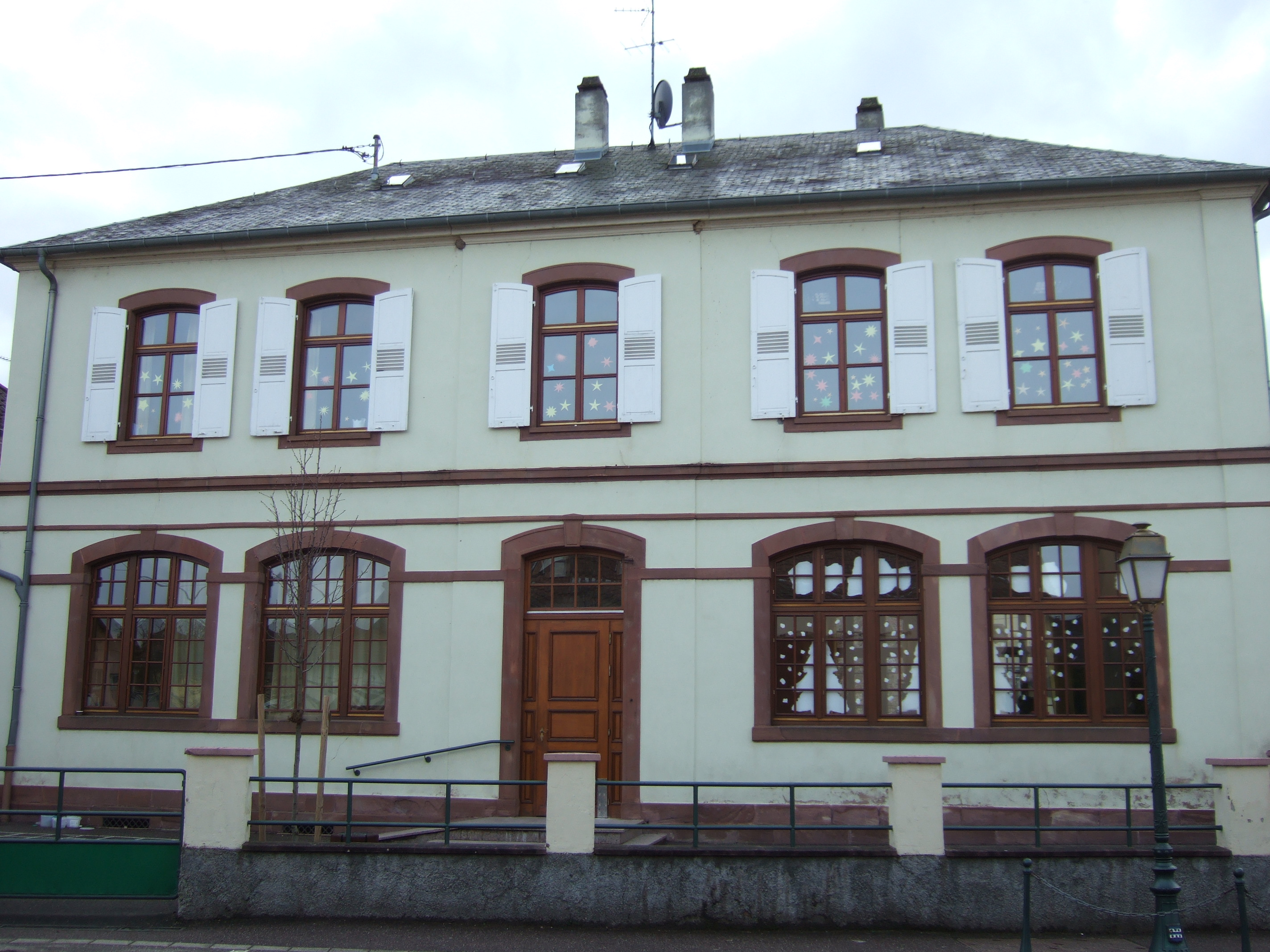 Osthouse ; Ecole construite en 1875 sur l'ancienne ferme Loos